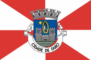 Bandeira municipal de Faro, Portugal. («Bandeira de hastear»)